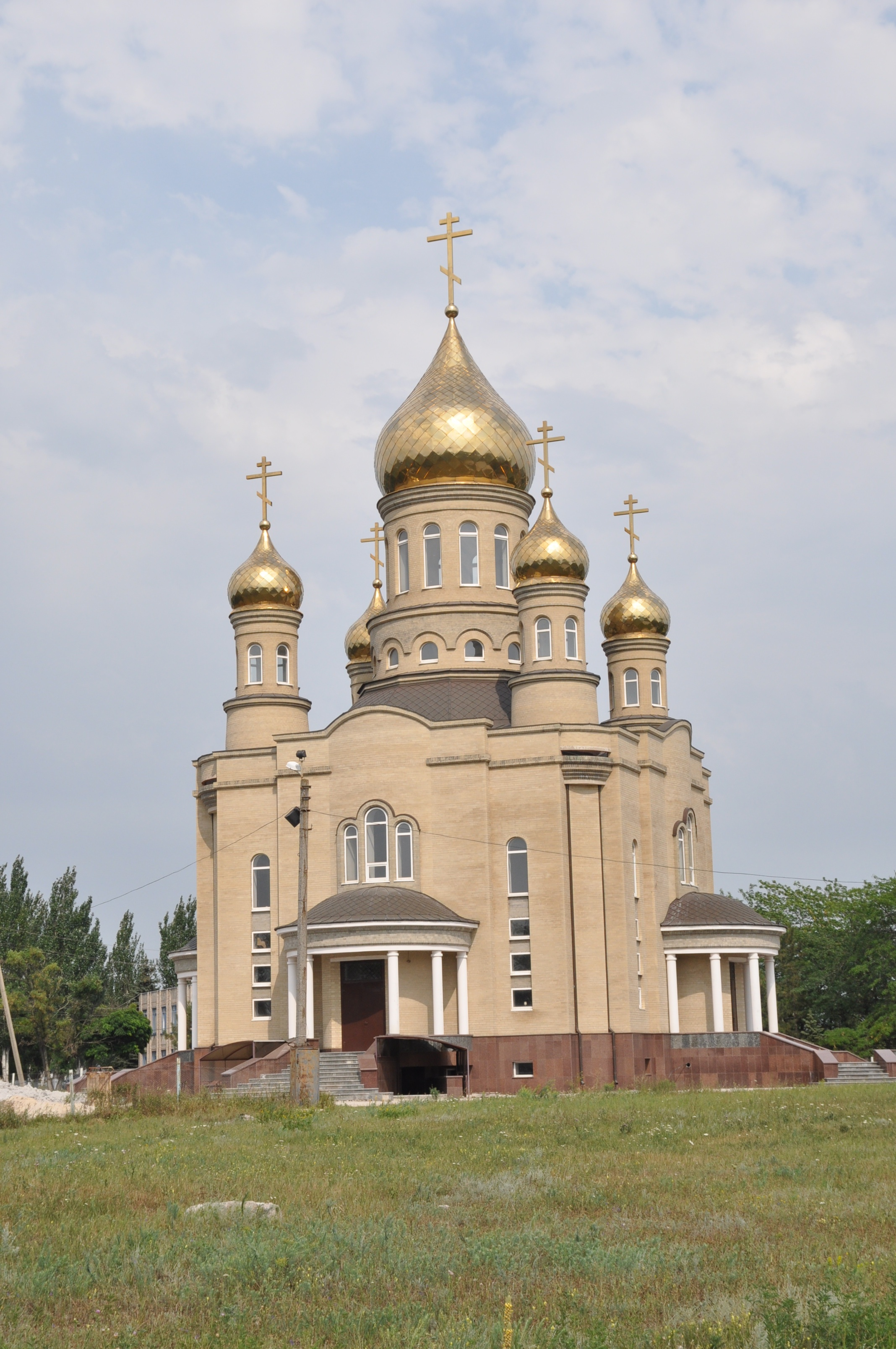 Донецкая область. Ялта.